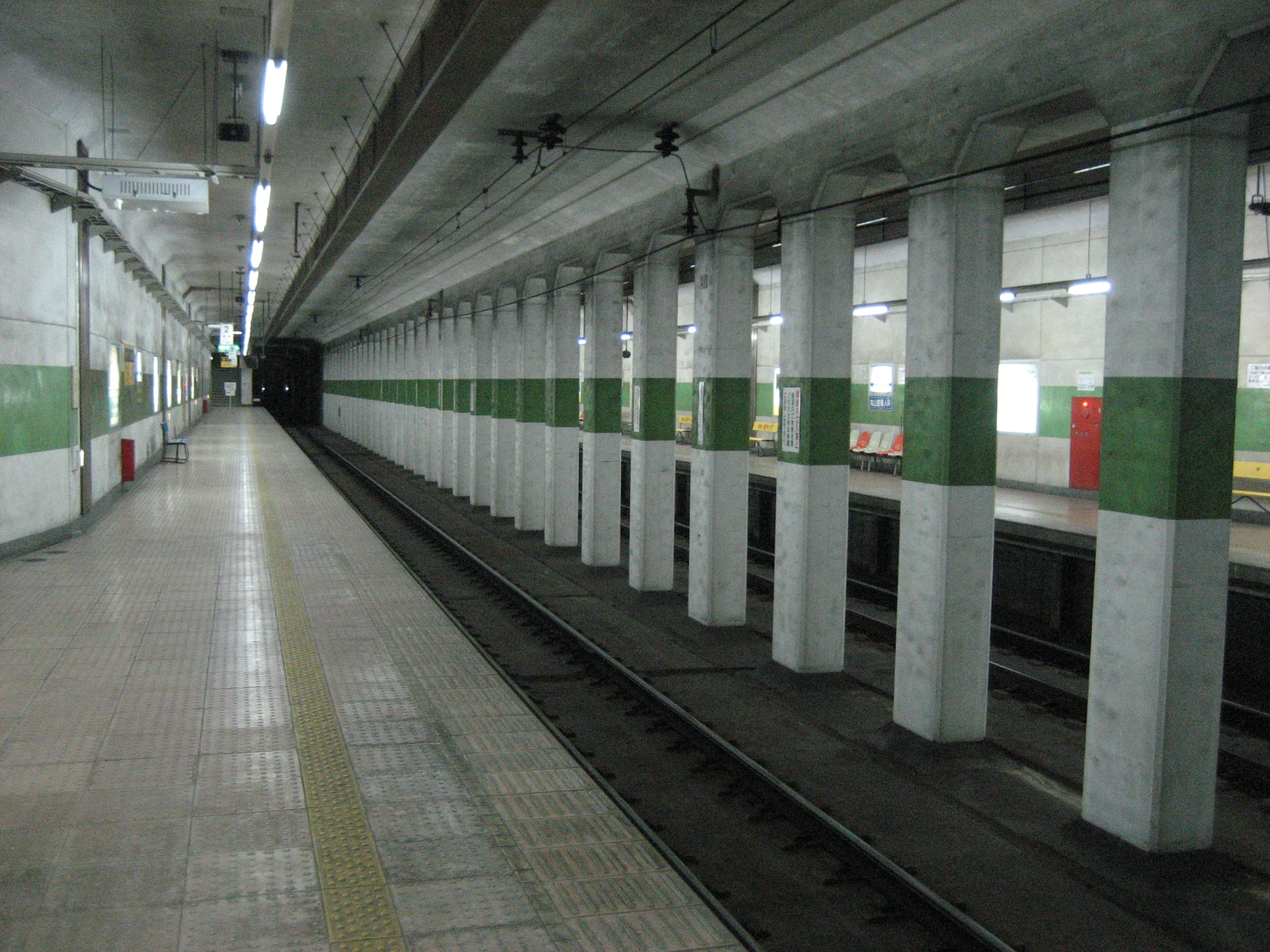 Shiyakushomae Sta.